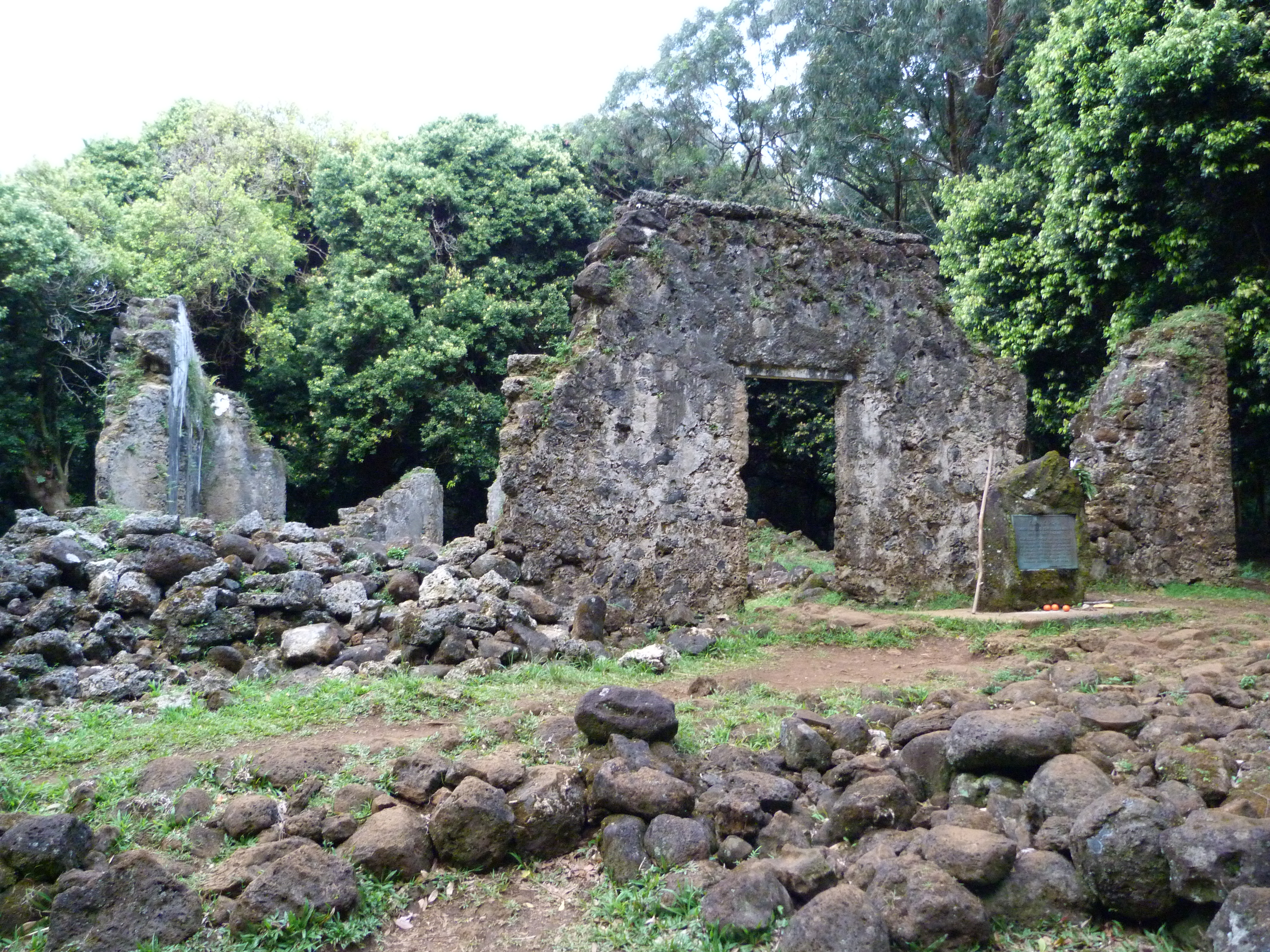 Kaniakapupu Ruins